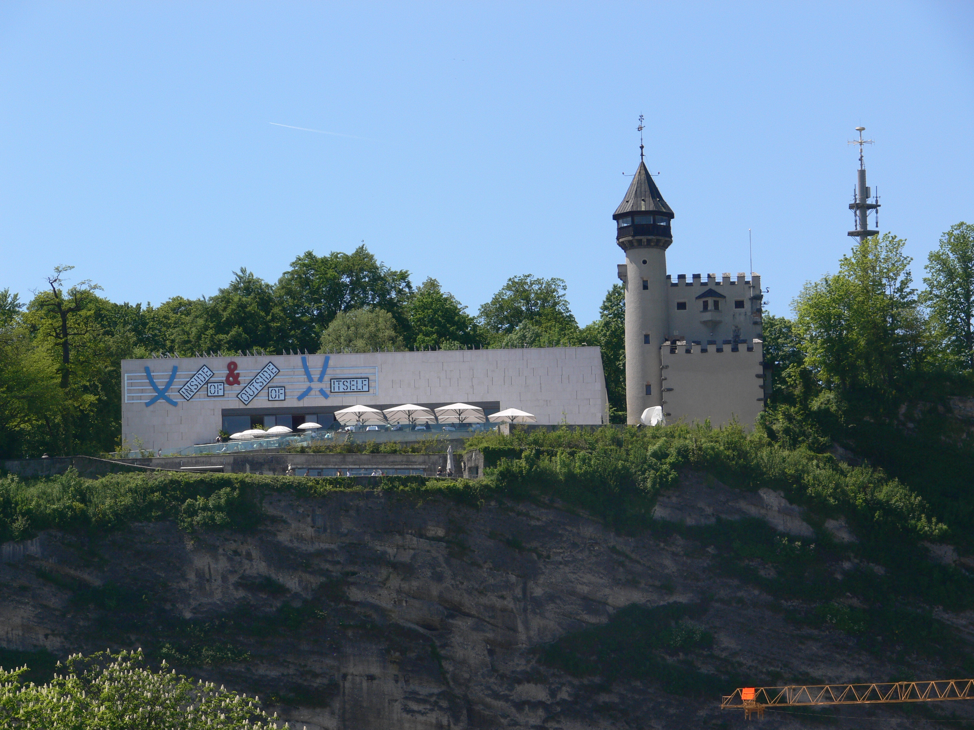 Museum der Moderne Salzburg, Haus Mönchsberg